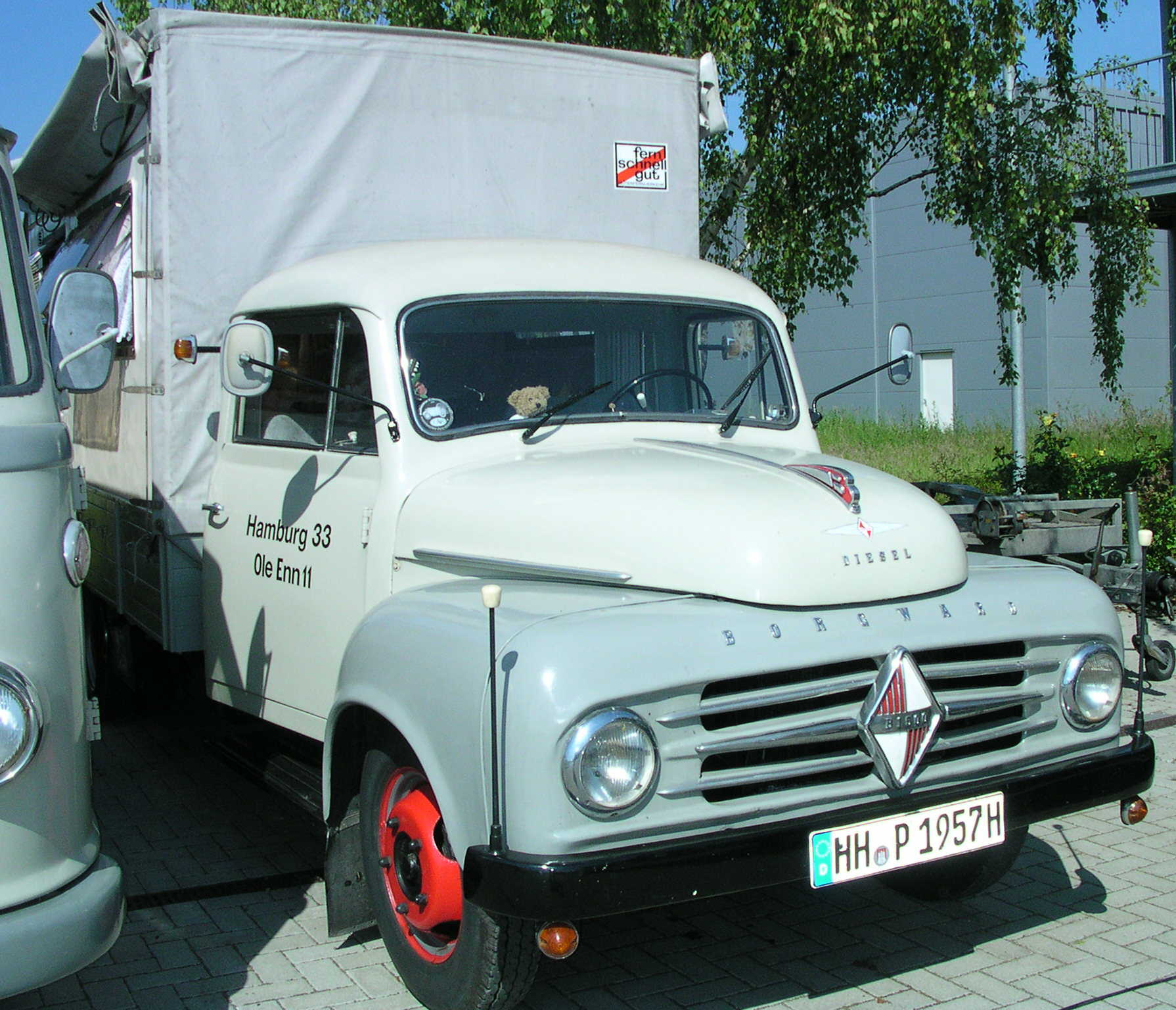 Willich, Borgward-Treffen im LKW-Museum, LKW B1500 Diesel (1758cm3 Hubraum, 42 PS, mit dem ab April 1954 verwendeten „Alligator"-Fahrerhaus